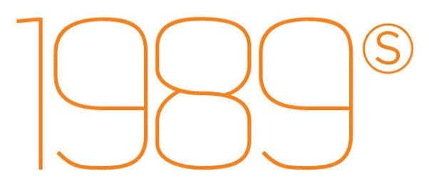 Logo của 1989s Production